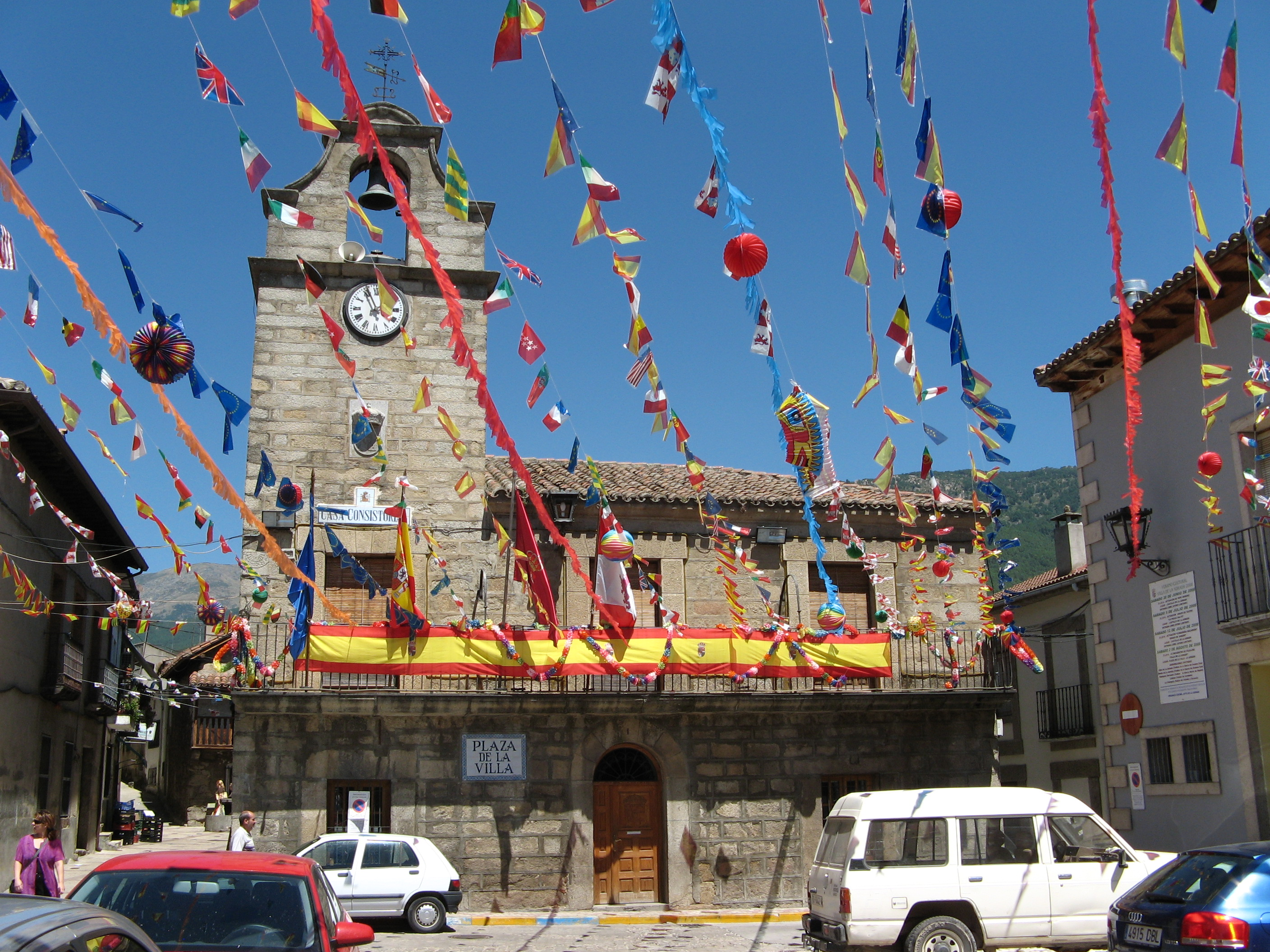 Ayuntamiento. La Adrada, Ávila, Castilla y León. España